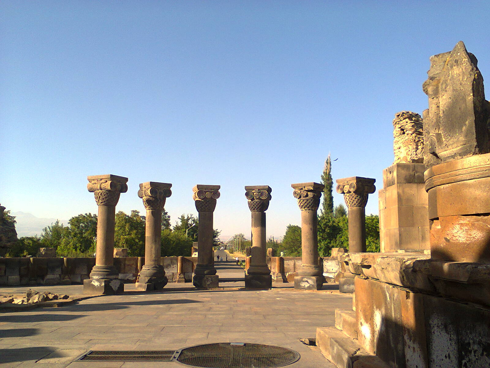 Zvartnots Cathedral, 7th-century 2/13